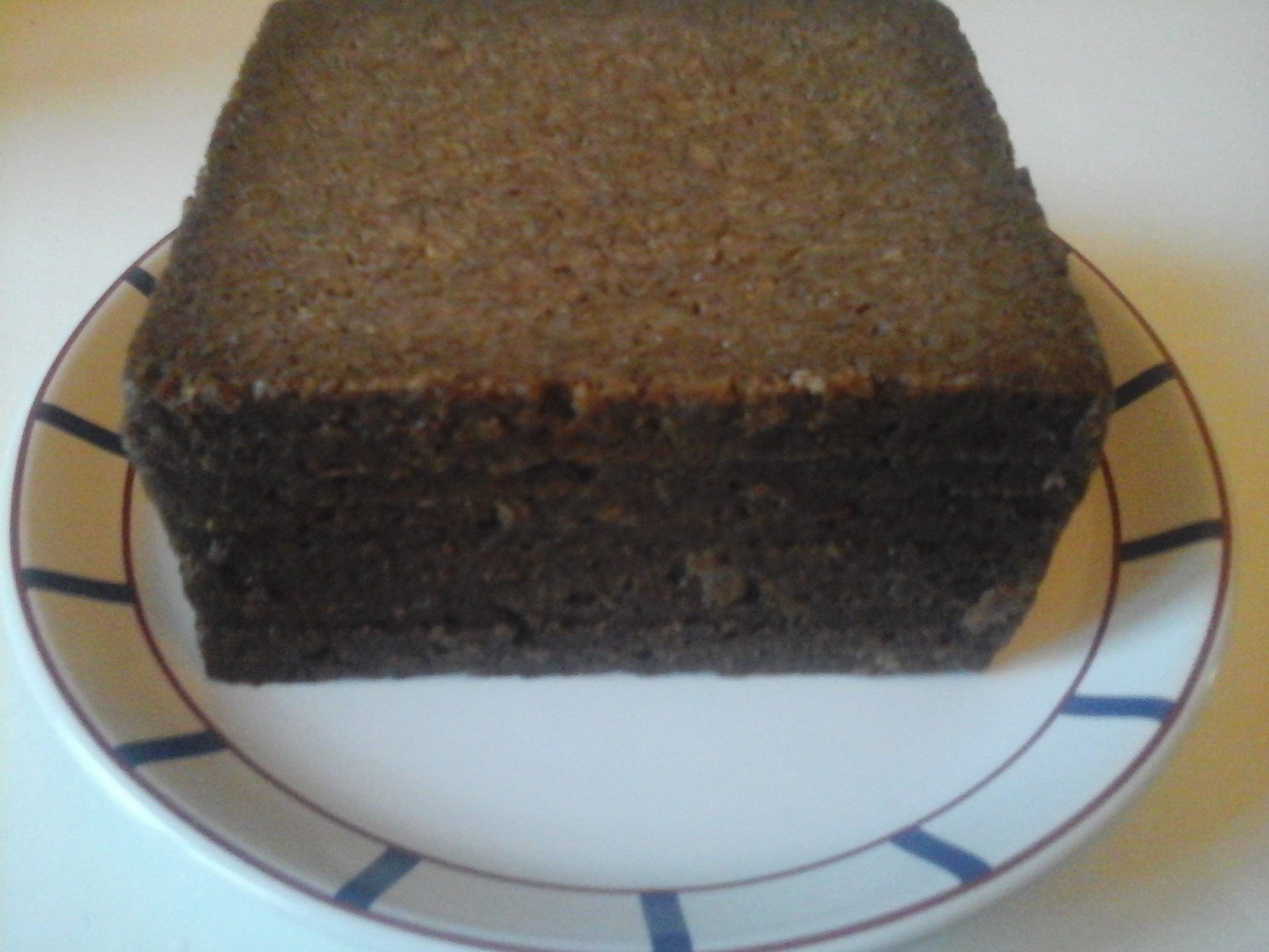 Pumpernickel allemand au seigle.